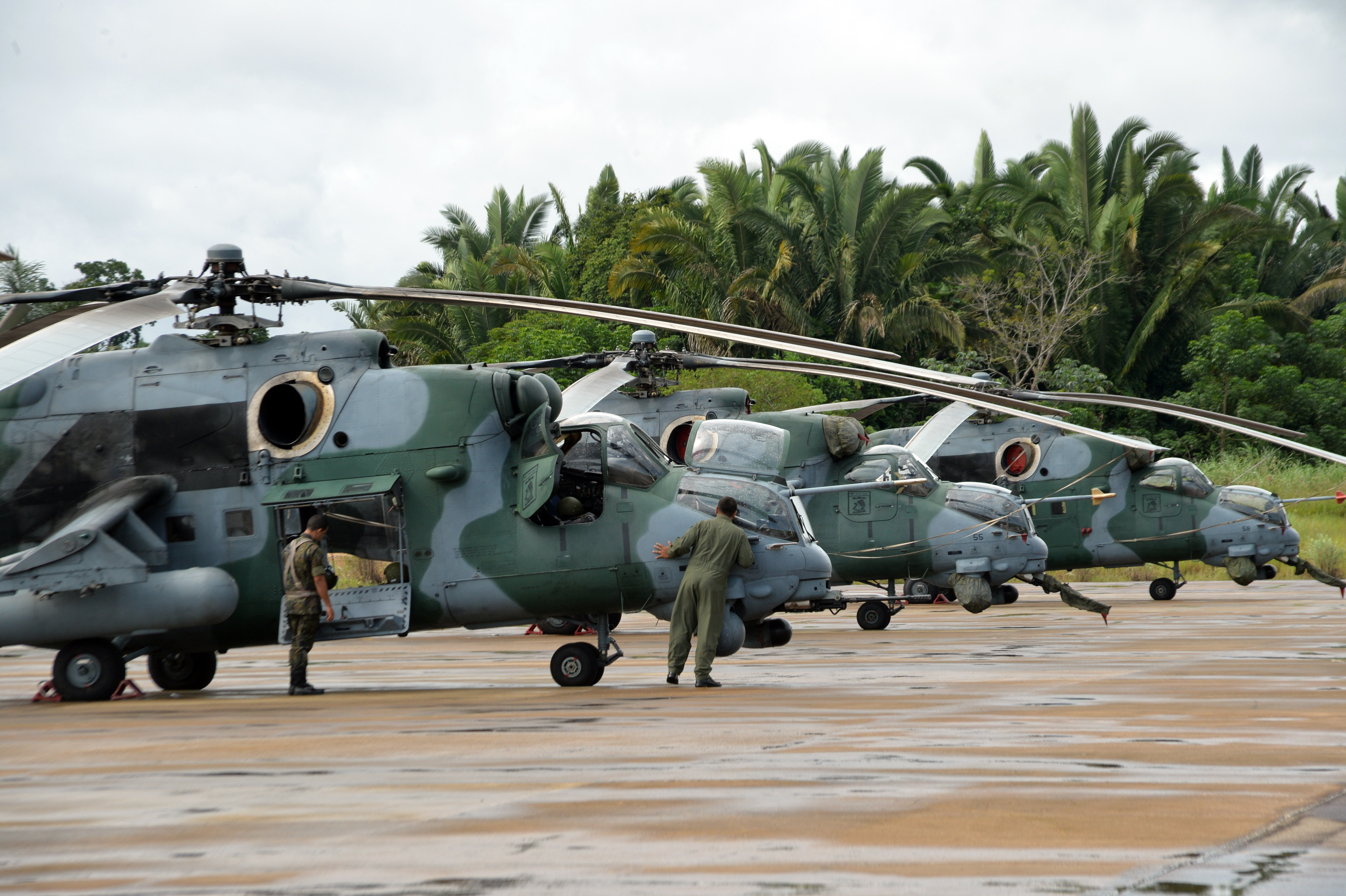 24/03/2015, Porto Velho - RO Fotos: Jorge Cardoso